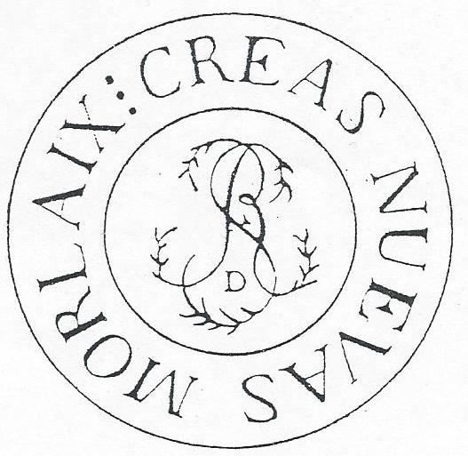 Copie du timbre du bureau des toiles de Léon à Morlaix (fin du XVIIe siècle). Le bureau des toiles avait été créé à Morlaix pour contrôler la qualité des produits mis en vente. Les opérations de contrôle se déroulaient dans une salle de l'hôtel de ville. La charge de scelleur (contrôleur) se transmettait de père en fils. La légende Creas nuevas ("Crées [toiles] neuves") est en espagnol car les crées du Léon étaient surtout exportées en Espagne.